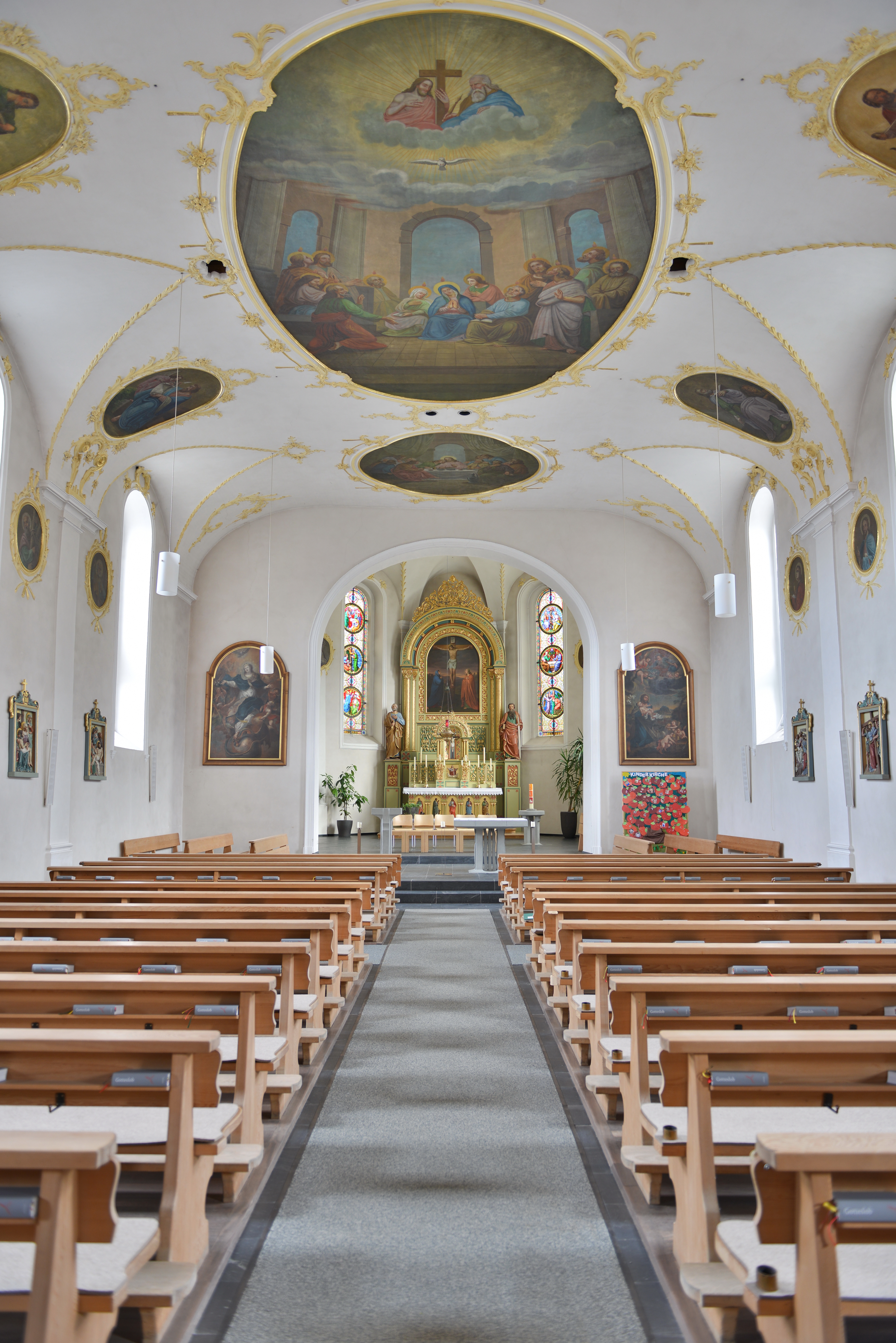 Hl. Petrus&Paulus Pfarrkirche der Gemeinde Andelsbuch